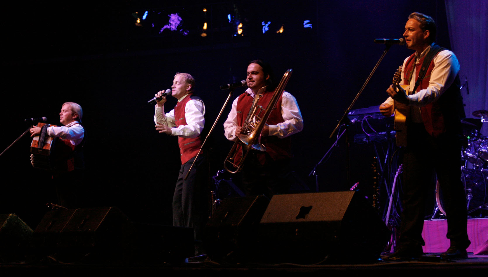 Die Edlseer beim 2. Jubiläumsfest der Volksmusik Superstars in der Wiener Stadthalle.